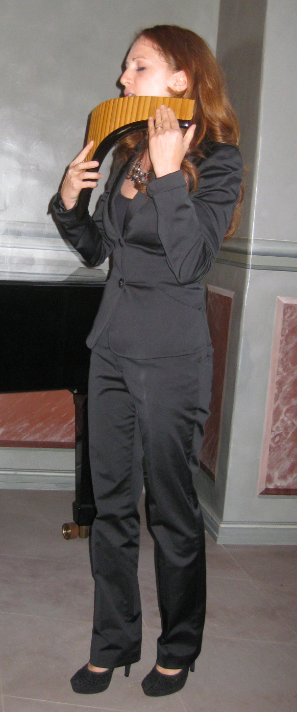 Die aus Rumänien stammende und in Deutschland lebende Panflötistin Petruța Küpper bei ihrem Auftritt am 17. September 2010 im Rittersaal von Schloss Iburg während der Verleihung des Courage-Preises 2010 an Peter Maffay